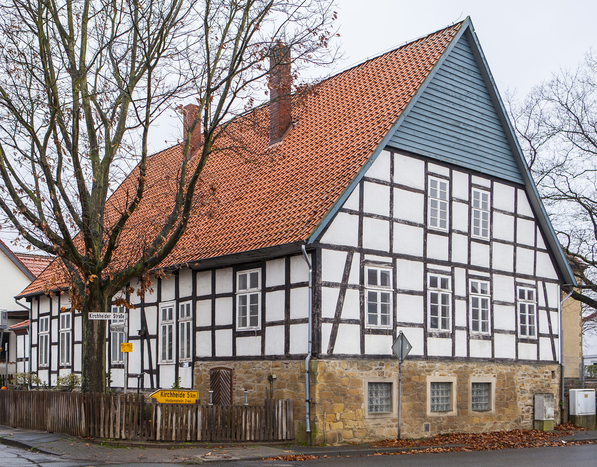 Bad Salzuflen-Wüsten, Kirchheider Str. 46This is a photograph of an architectural monument.